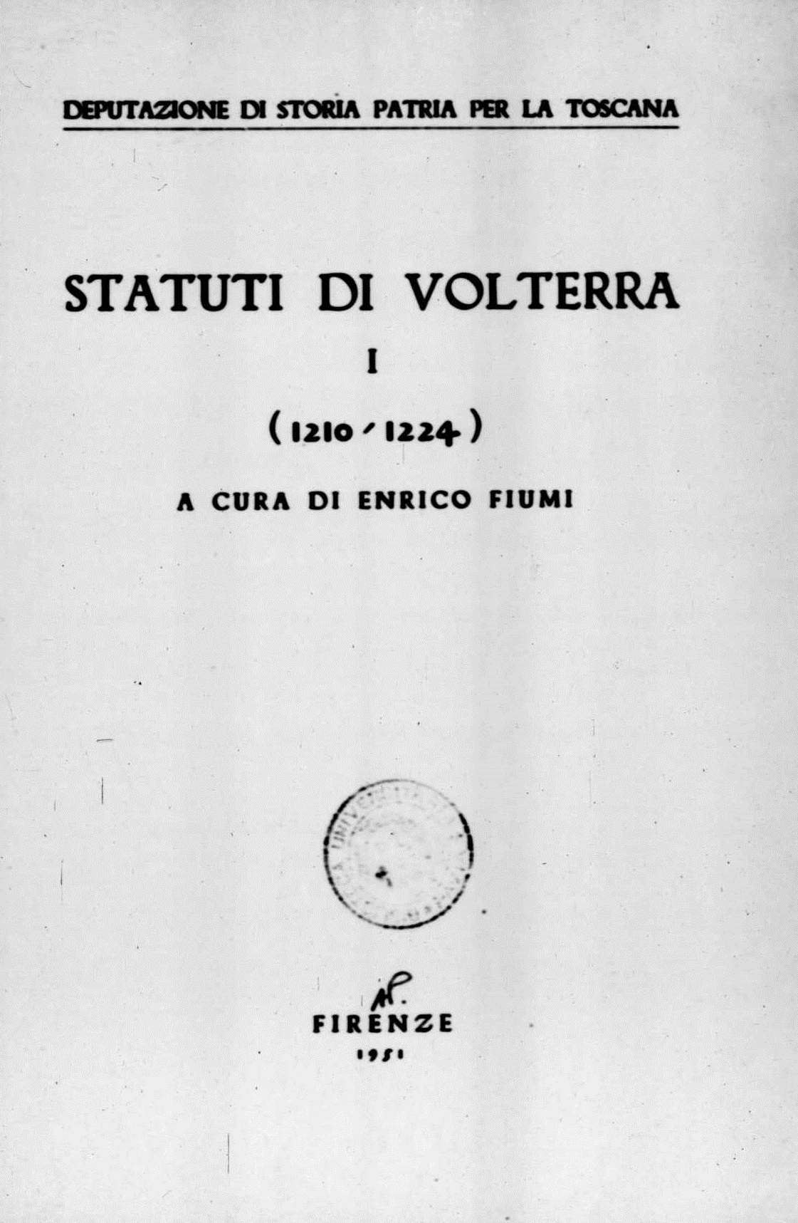 Frontespizio